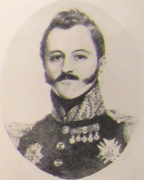 Description Antoine-Virgile Schneider Date21 September 2011Sourcehôtel du département de la MoselleAuthorAimelaimePermission (Reusing this file) Antoine-Virgile Schneider